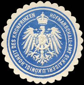 Sealing stamp Title: Hofmarschall - Amt Seiner Kaiserlichen und Königlichen Hoheit des Kronprinzen (Hohenzollern) Description: blau, weiß, geprägt Place: size: 3 cm